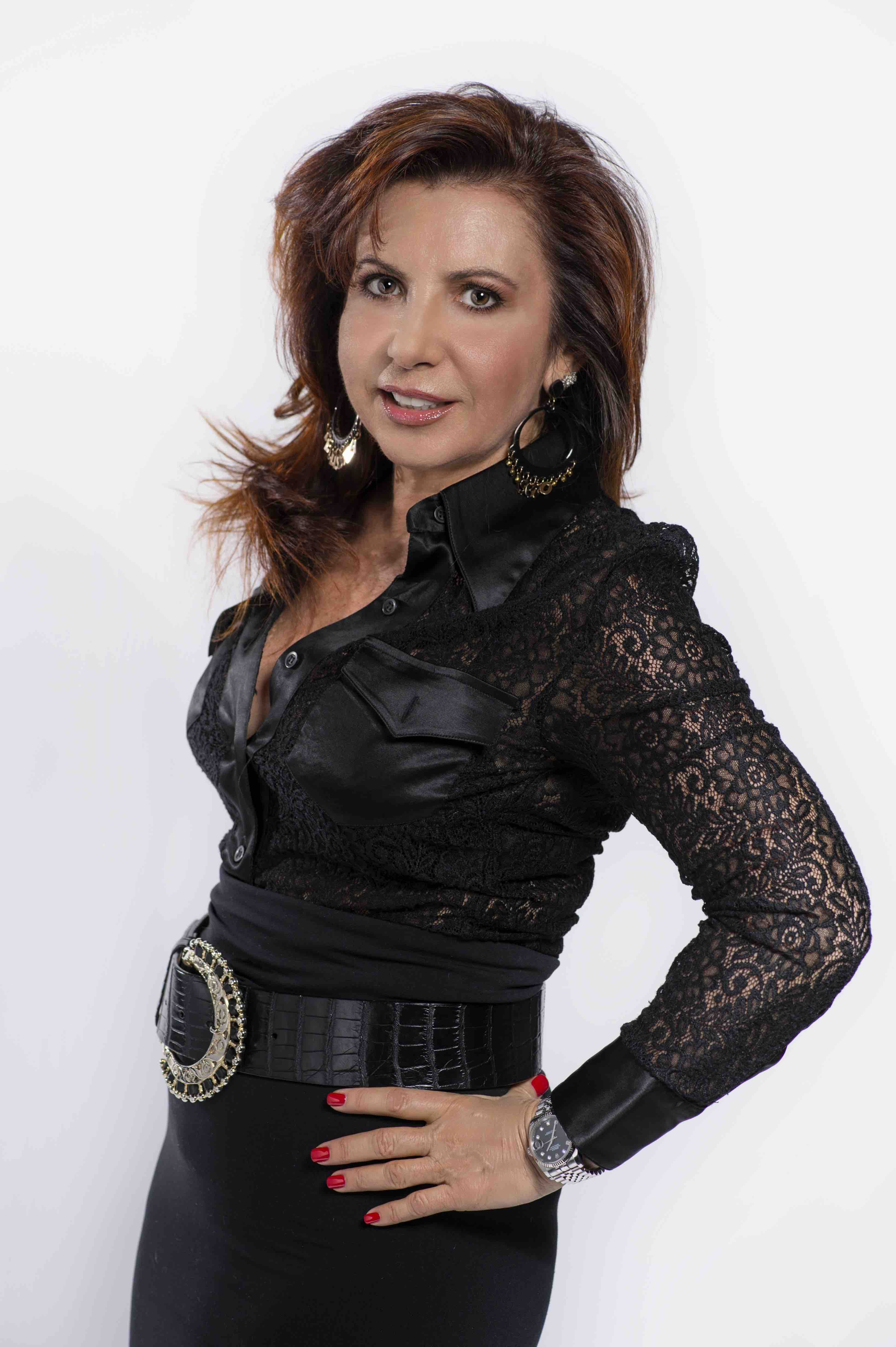 Mila By night